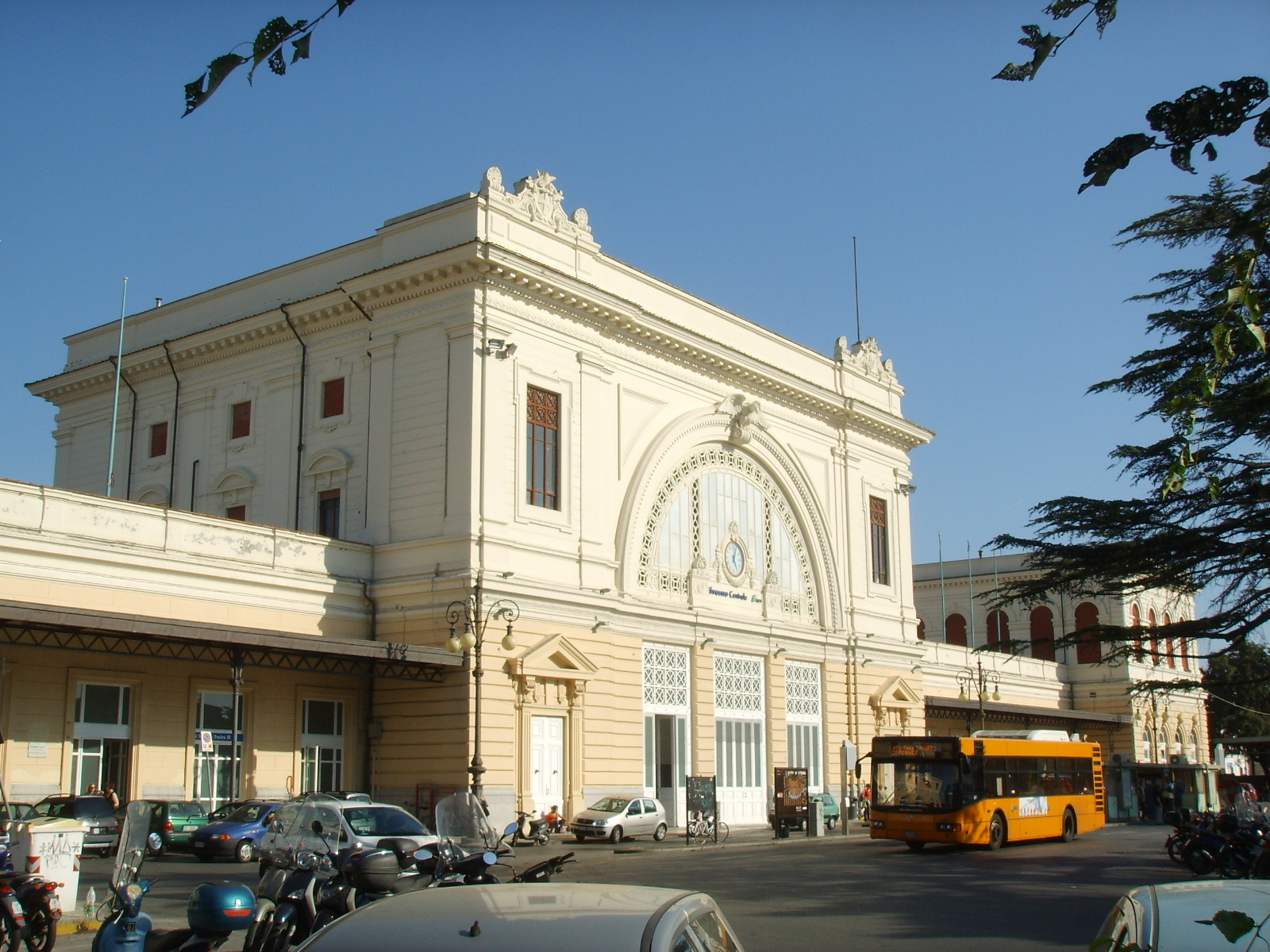 Stazione di Livorno